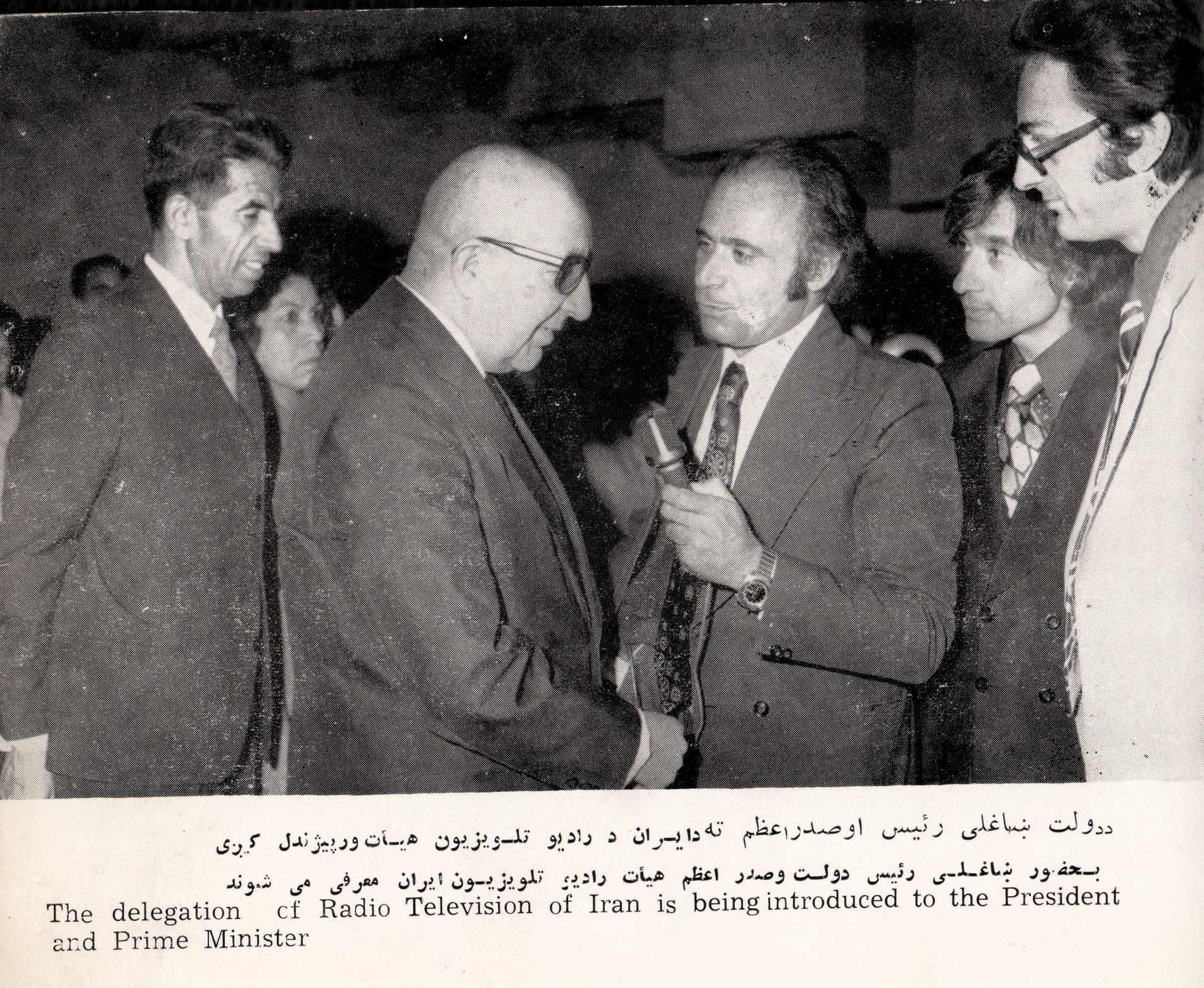 پښتو: پخوانی ولسمشر داود خان په ۱۳۵۳ لمريز کال کې